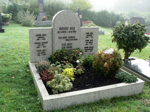 Ehemaliges Grab von Rudolf Heß in Wunsiedel mit dem Wahlspruch Ich habs gewagt von Ulrich von Hutten. Das Grab wurde am 20. Juli 2011 aufgelöst.